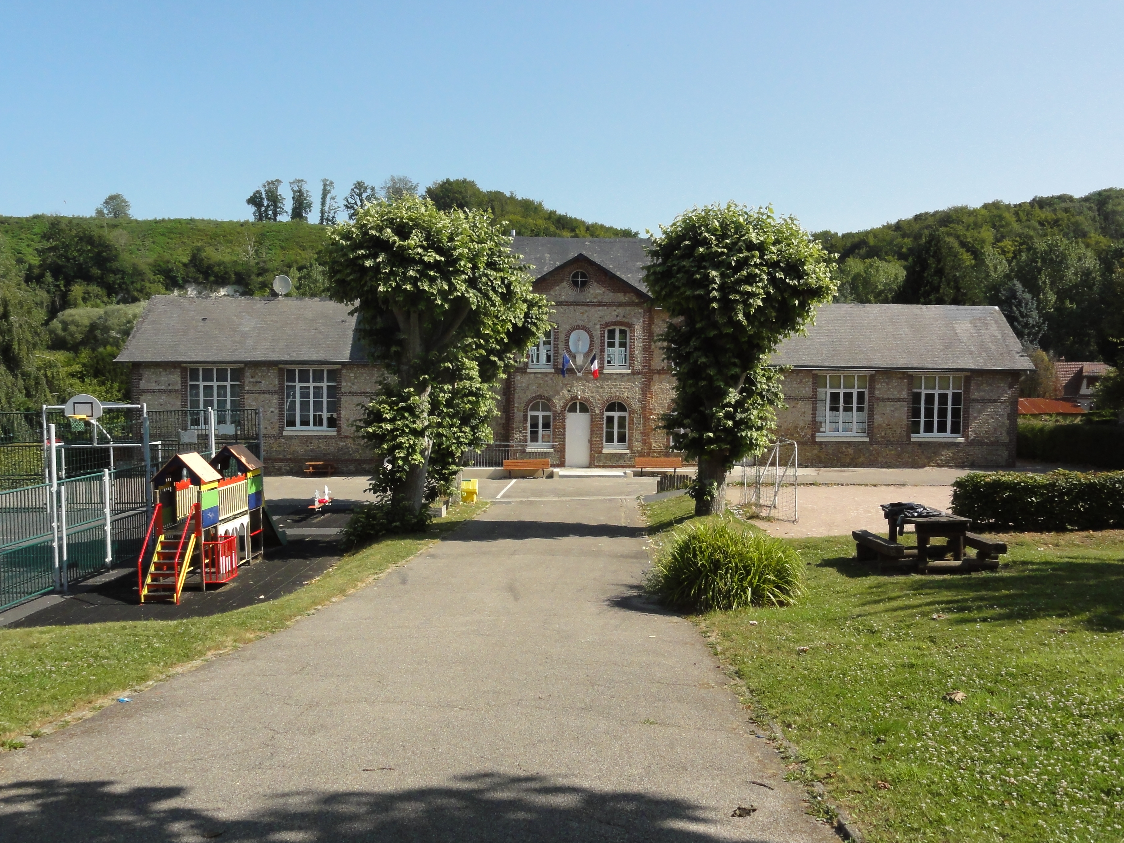 Bec-de-Mortagne (Seine-Mar.) école